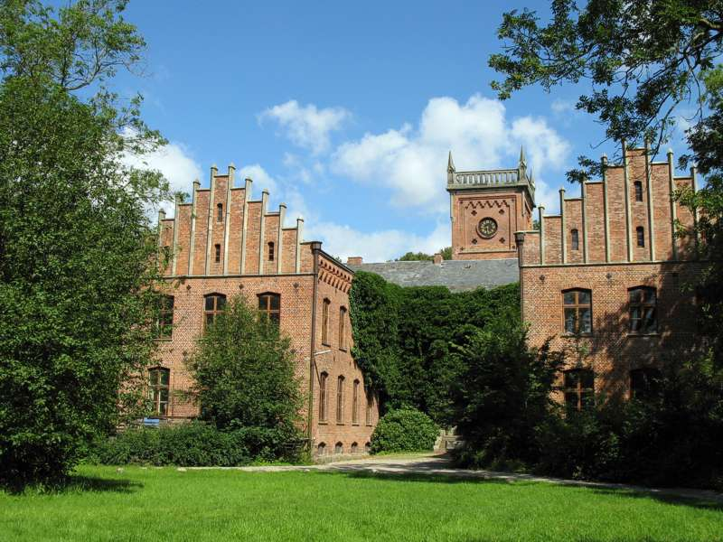 Gut Saxtorf